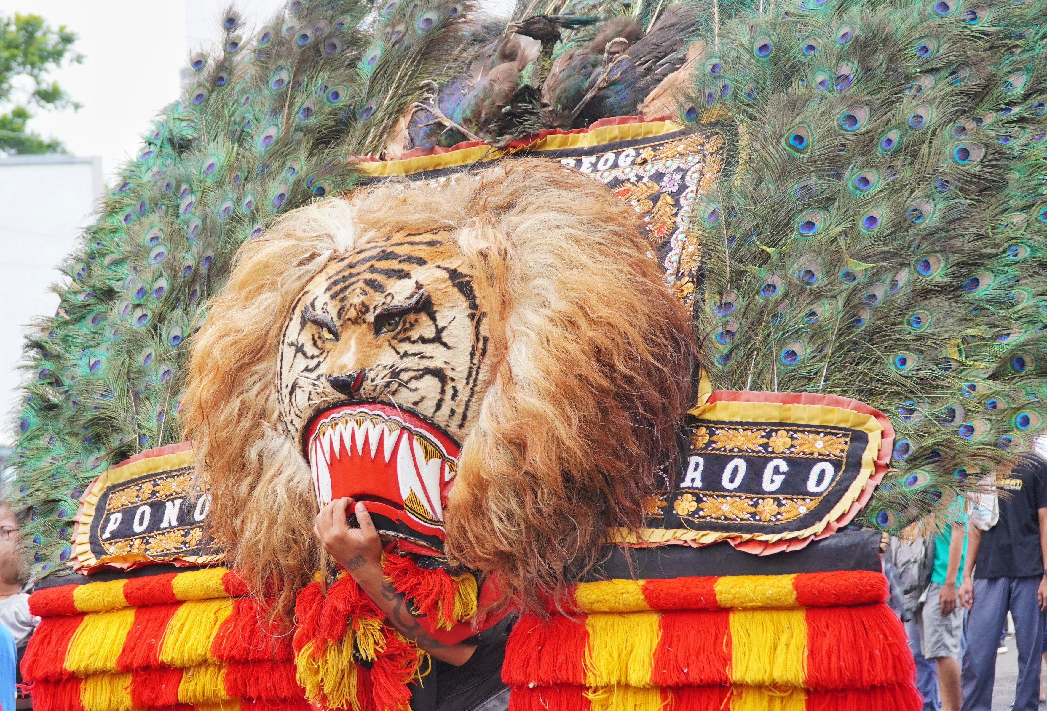 Reog adalah tarian tradisional dalam arena terbuka yang berfungsi sebagai hiburan rakyat, mengandung unsur magis, penari utama adalah orang berkepala singa dengan hiasan bulu merak, ditambah beberapa penari bertopeng dan berkuda lumping